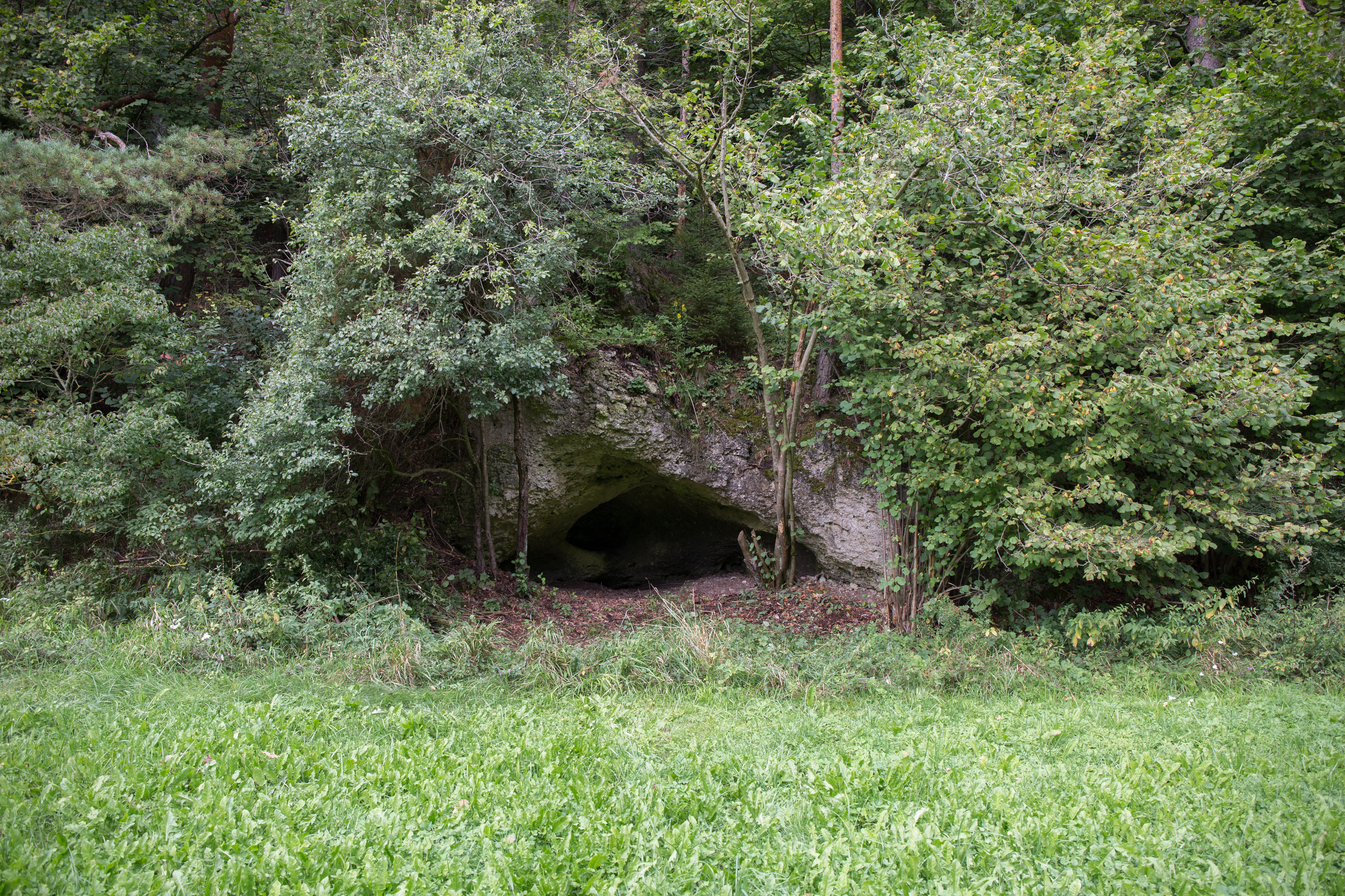 Ansicht der kleinen Halbhöhle "Backofen"